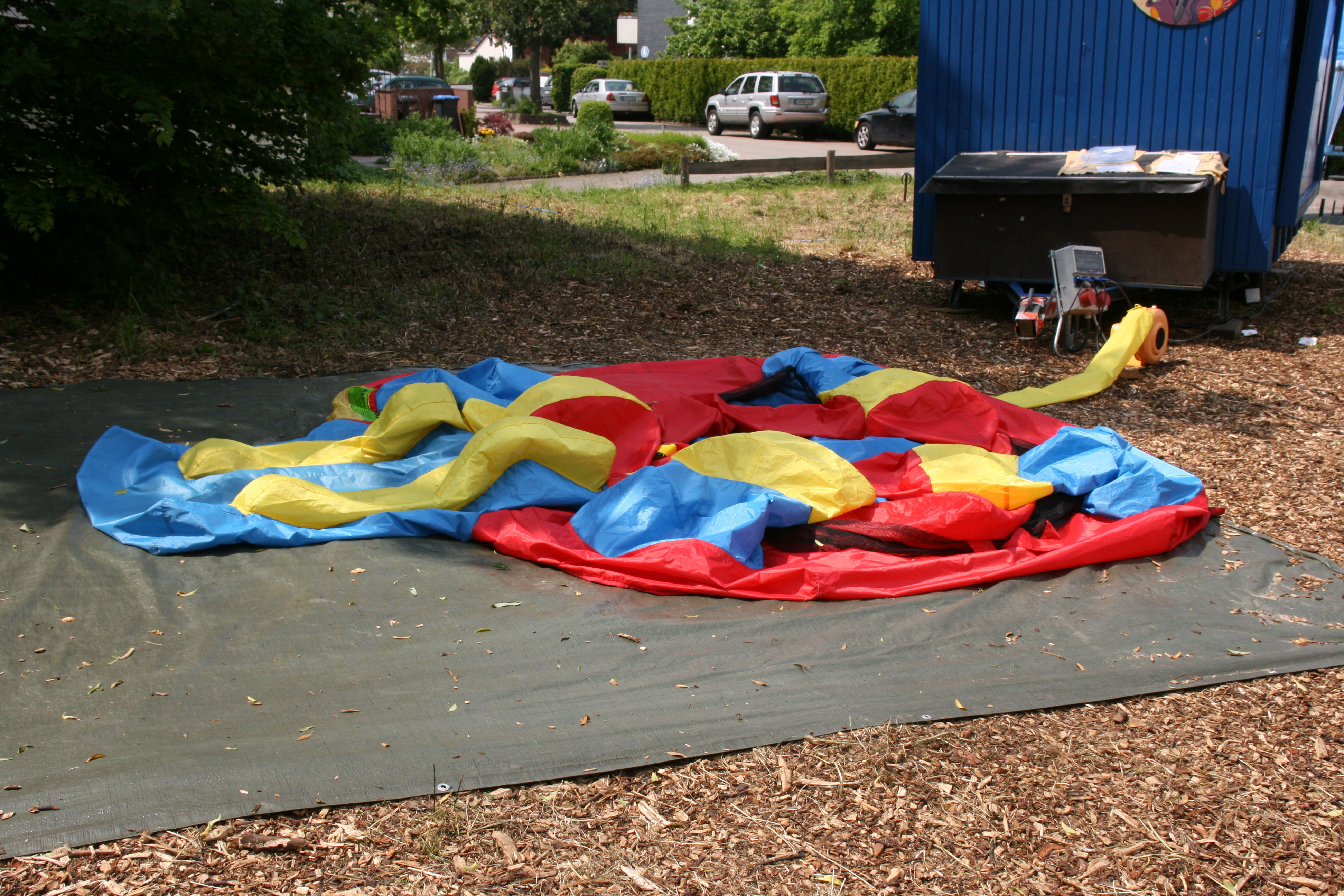 Schachtzeichen an der ehemaligen Zeche Vereinigte Hamburg und Franziska, Schacht Theodor, in Witten-Stockum